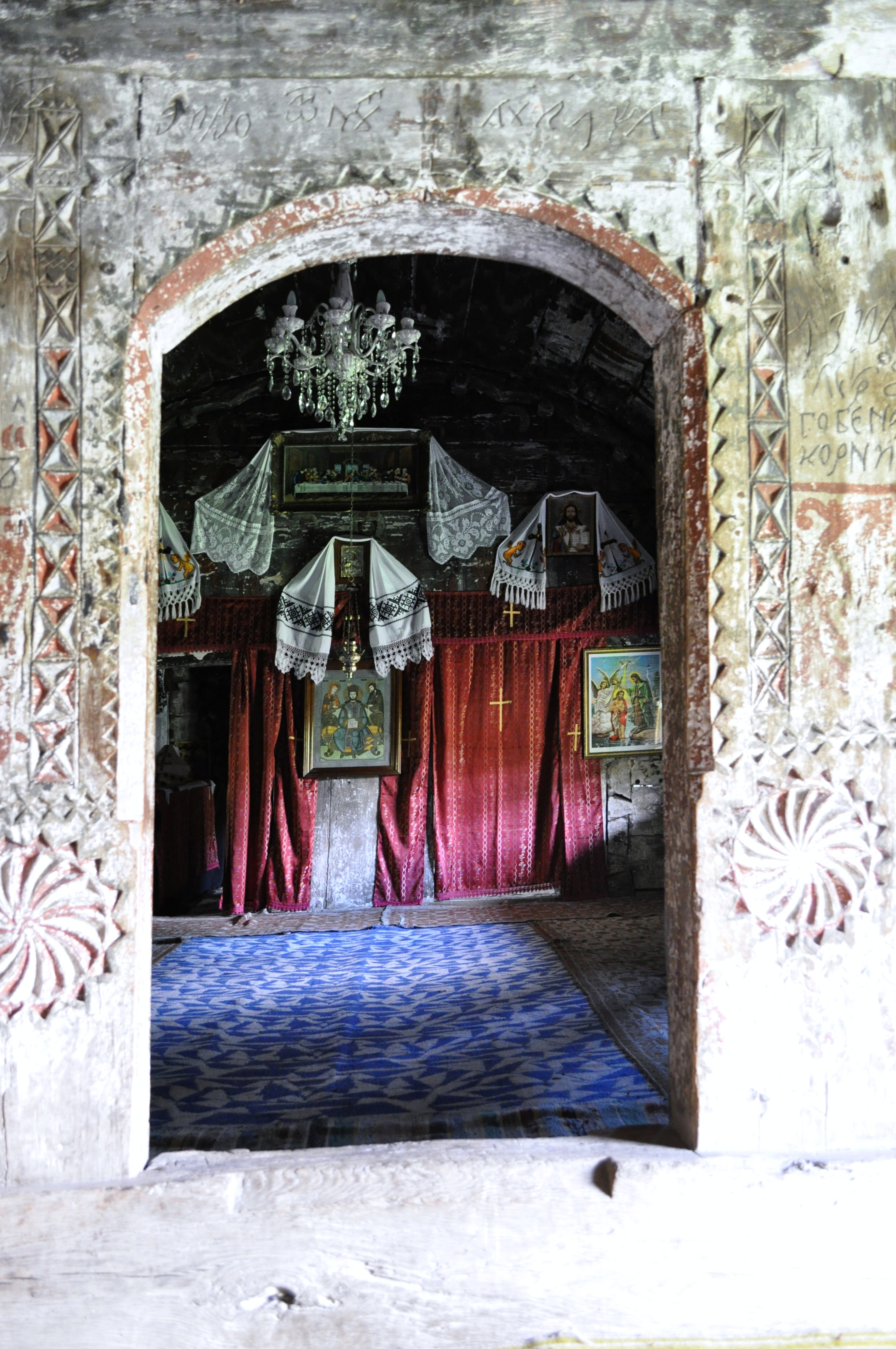 Biserica de lemn din Stolna, județul Cluj